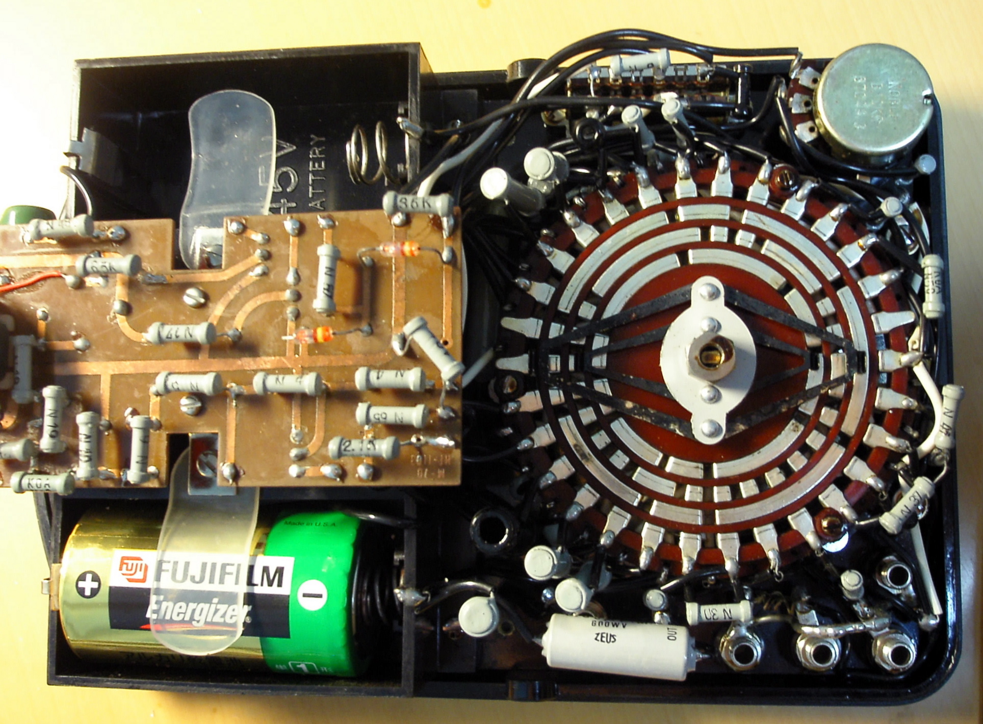 古い回路計の内部